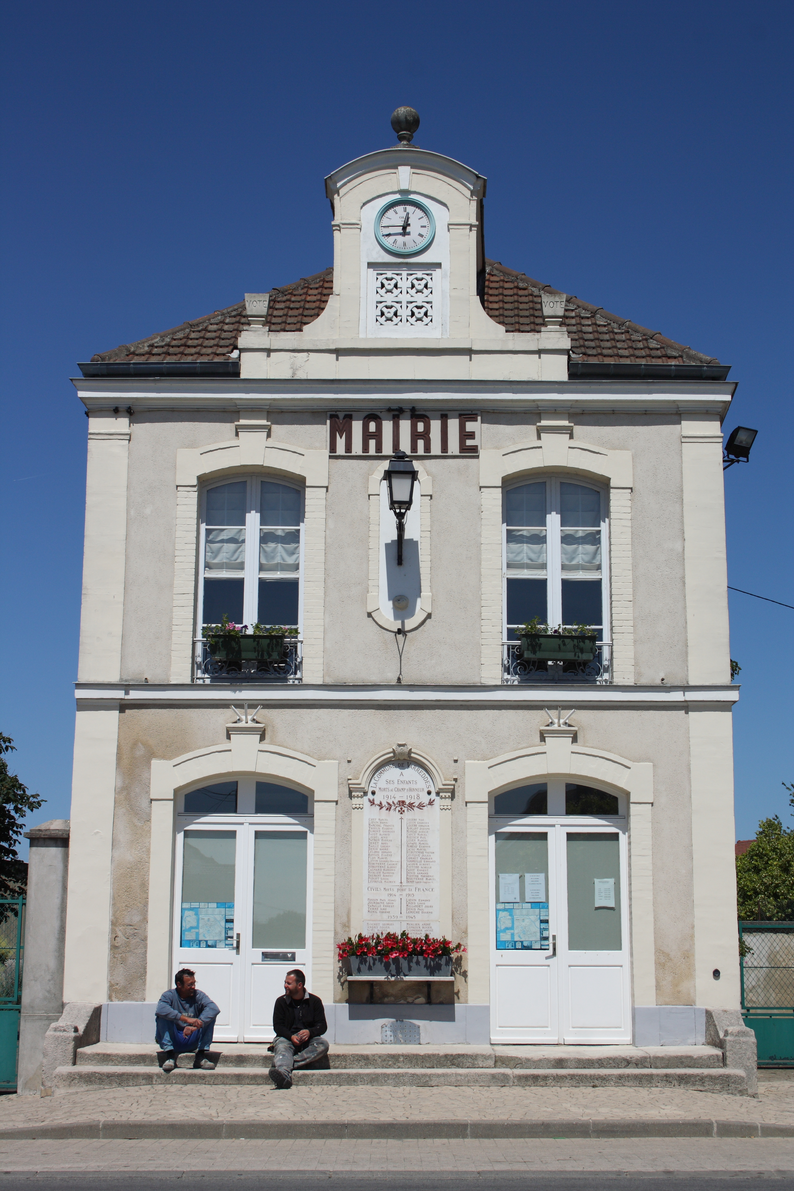 Rathaus in Varreddes